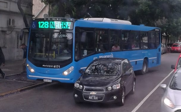 Unidad de la línea 128, ramal Negra, estrenado en noviembre de 2018 con el nuevo esquema para las líneas principales del nuevo transporte urbano de pasajeros de Rosario.